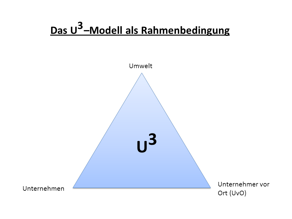 Umwelt, Unternehmen und Unternehmer vor Ort (Mitarbeiter), als Rahmenbedingung für die Gestaltung des Personalwesens (Human Resource Management)